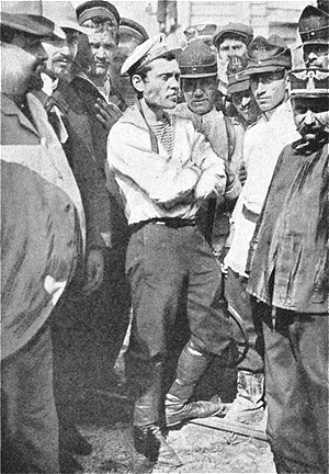 Matuschenko. Photographie prise au débarquement à Constantza.